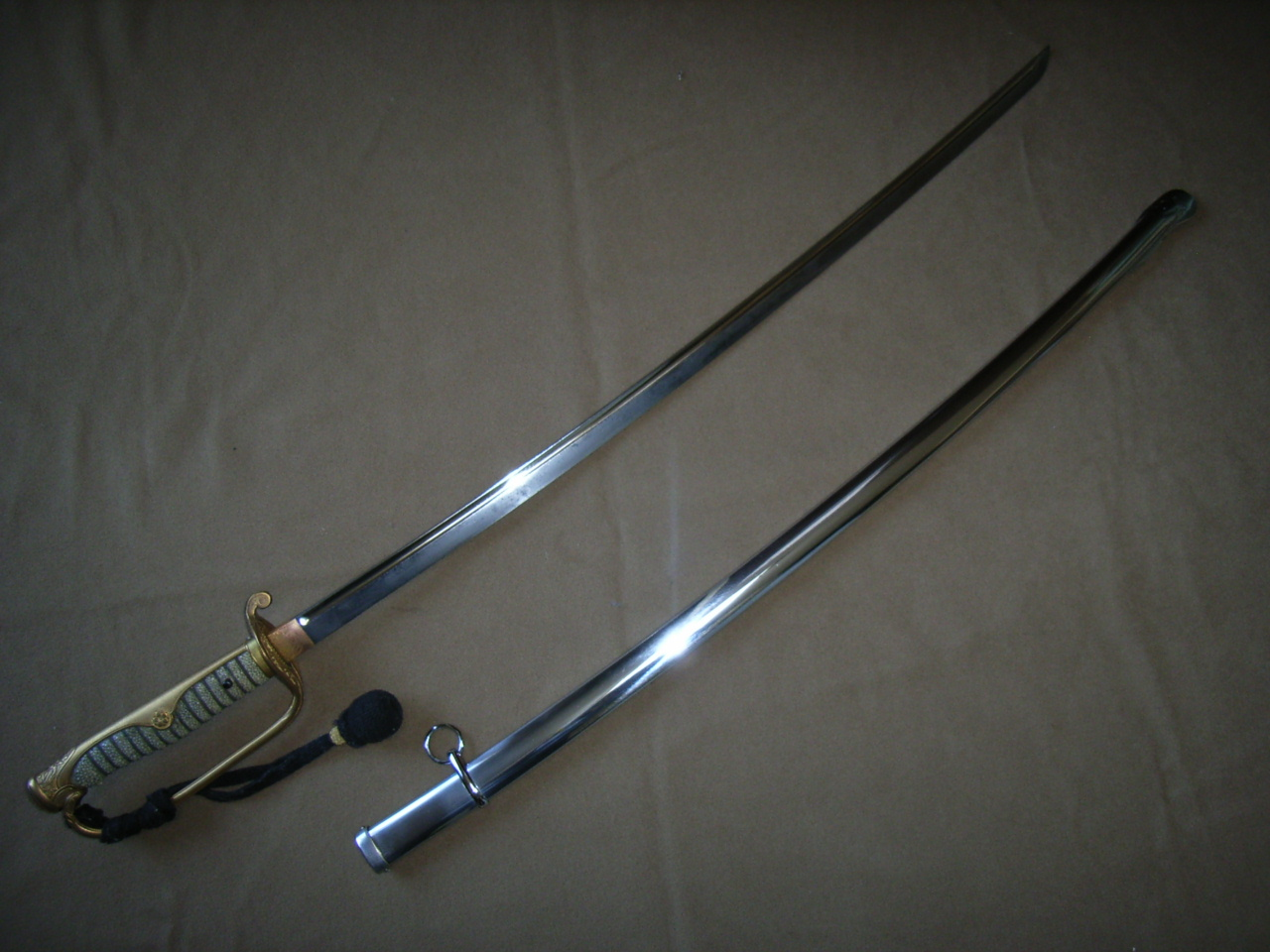 昭和9年まで使われた俗に旧型軍刀と呼ばれる軍刀。背金に唐草模様のない尉官が使用するタイプ。終戦まで使用する者もいた。